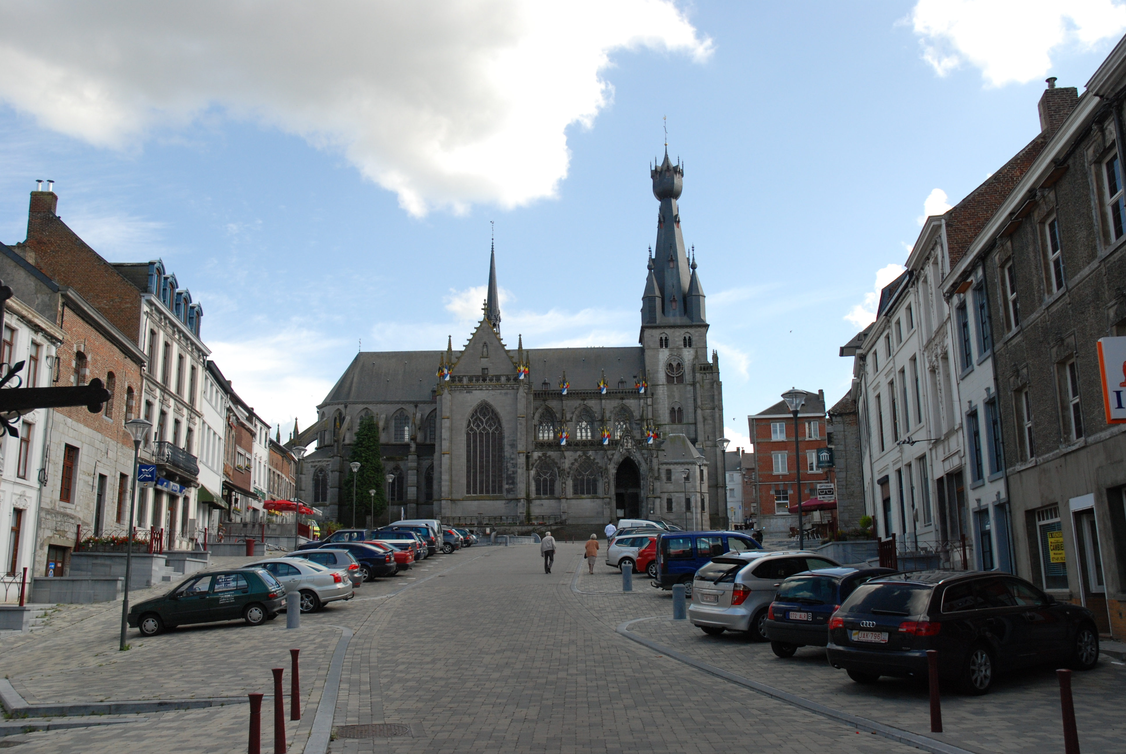 de Sint-Maternusbasiliek van Walcourt, België